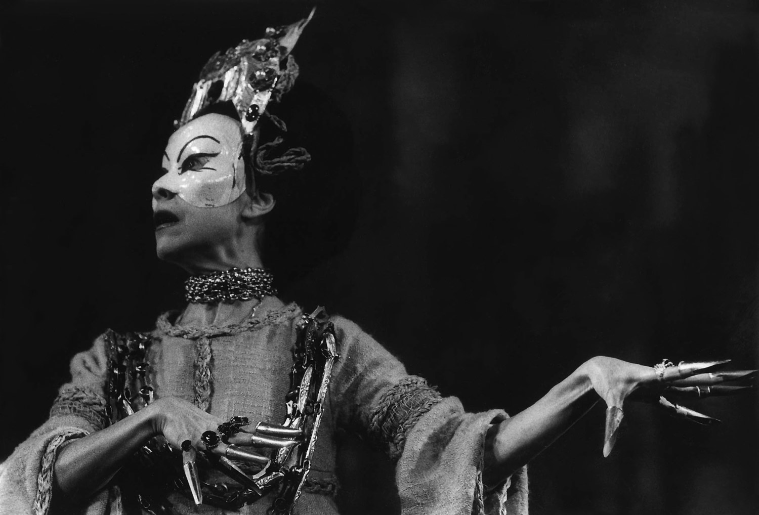 Ana Maria Ventura en la Gobernadora en "El círculo de tiza Caucasiano”, de Bertolt Brecht